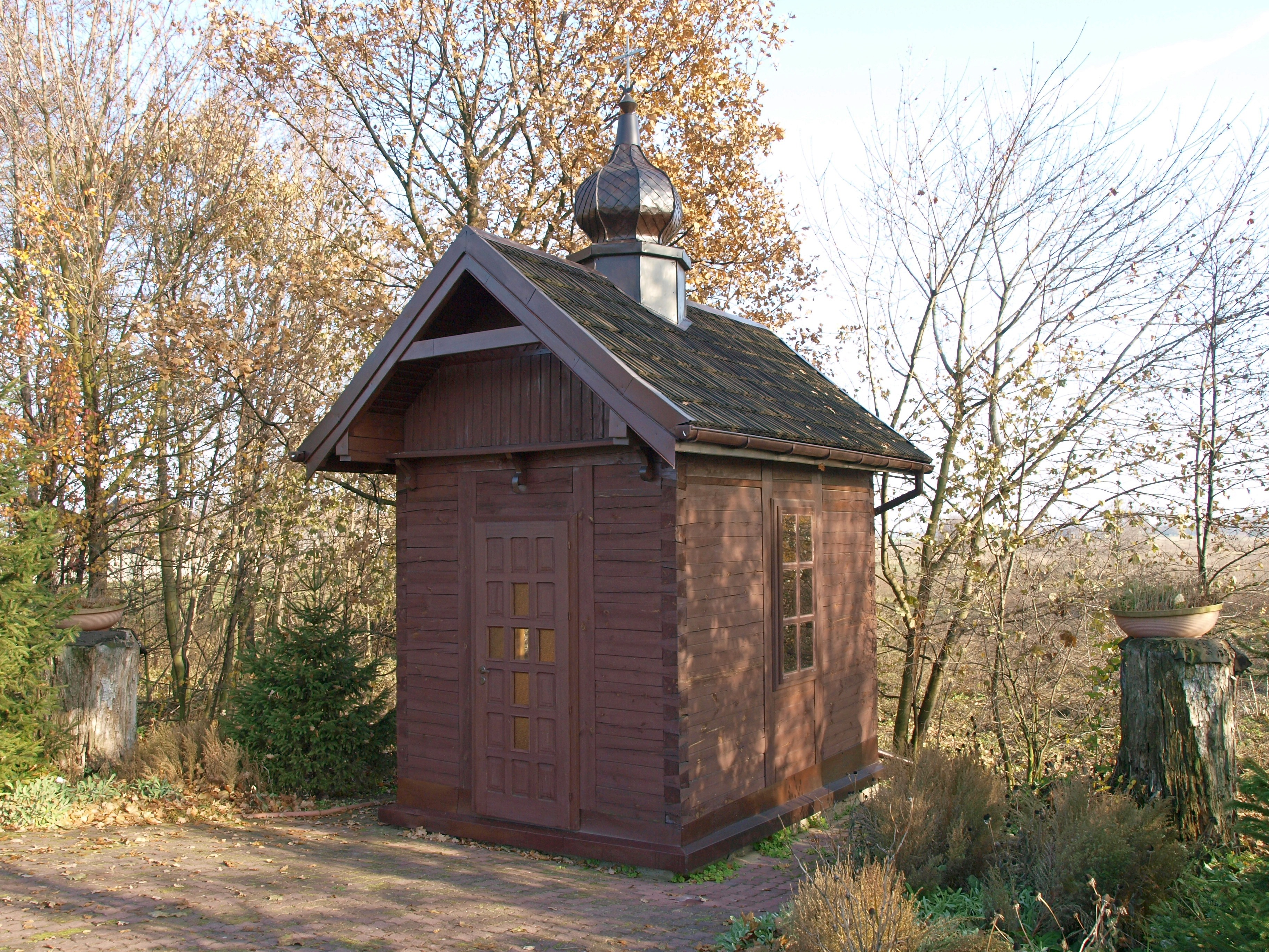 Broszęcin kapliczka XIX w